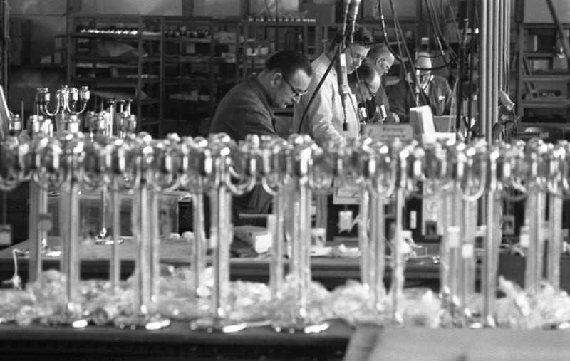 Kaiser-Leuchten-Fabrik Neheim-Hüsten